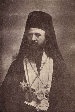 Фотографија је објављена у часопису Весник Српске цркве, март-април 1913. год. Издање: Свештеничко удружење, Београд. стр. 285. Фотографију сам скенирао и обрадио јуна 2010. године